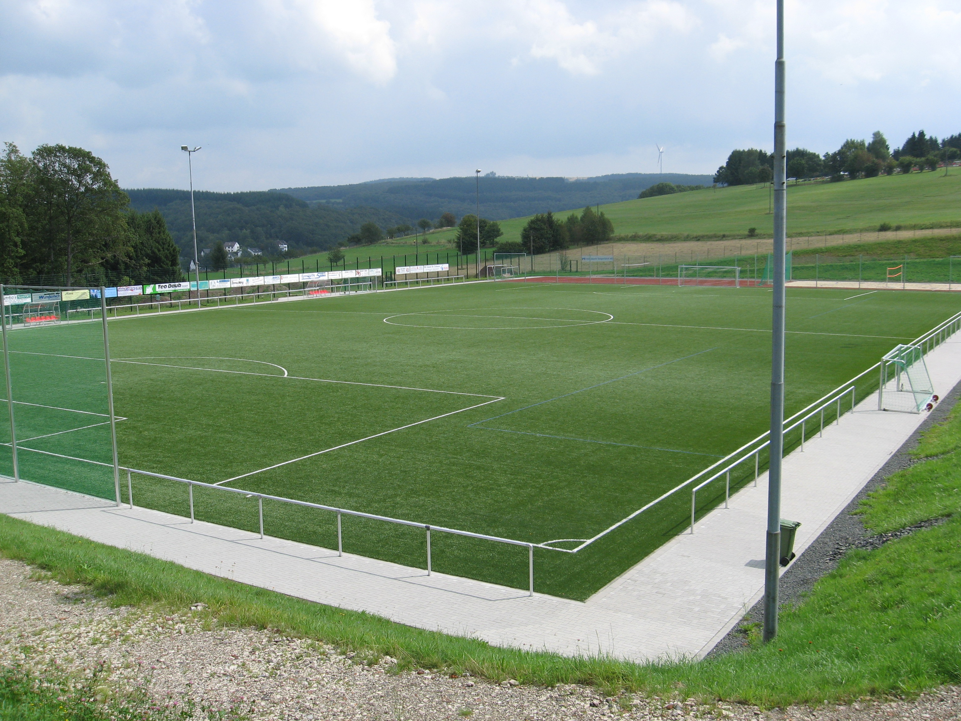 Der in den Jahren 2008/2009 modernisierte Sportplatz in Wilden (Wilnsdorf, NRW).